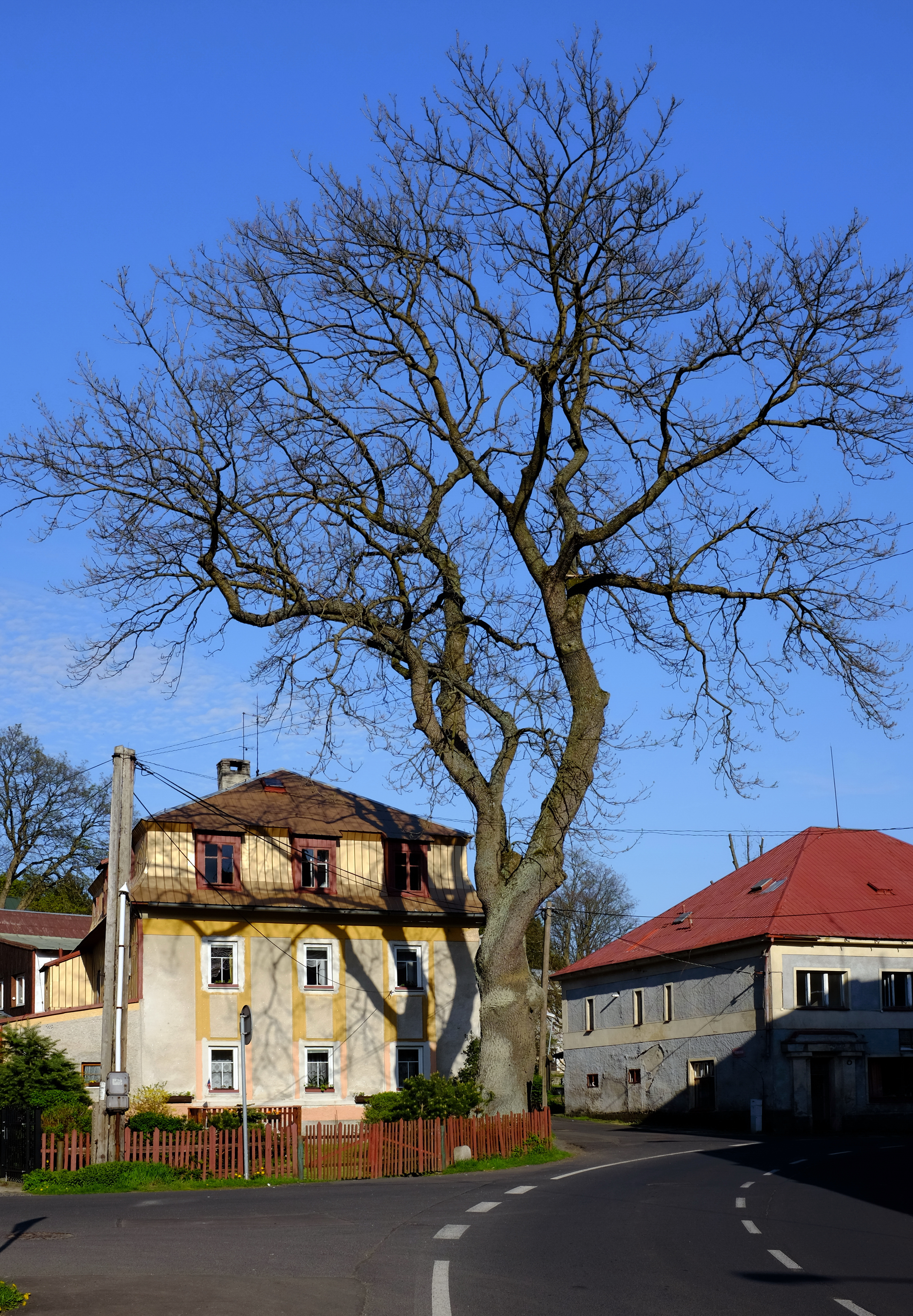 Památný strom - Vetešníkův jasan v Perninku - Pernink, okres Karlovy Vary